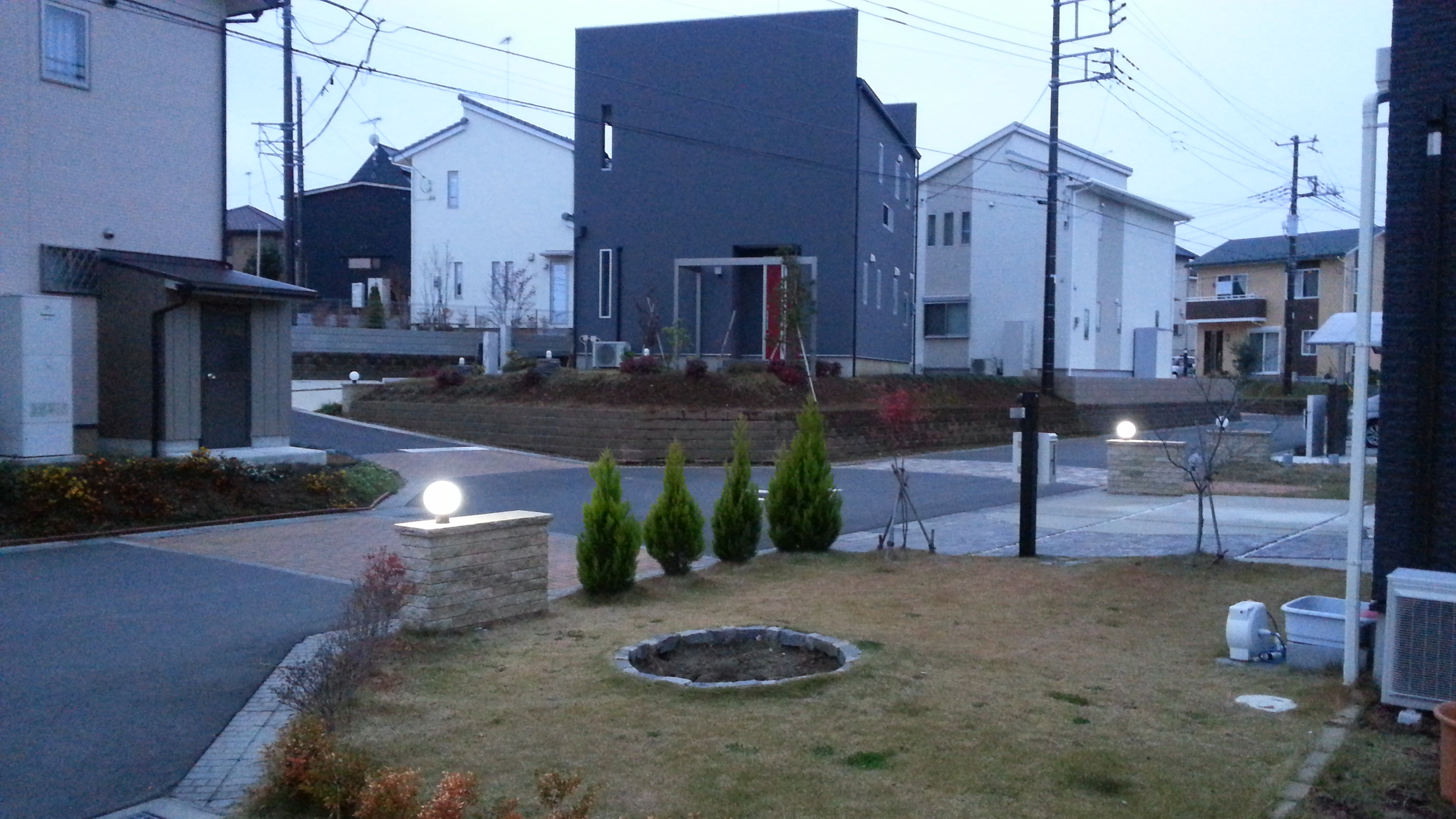 土浦市中 3